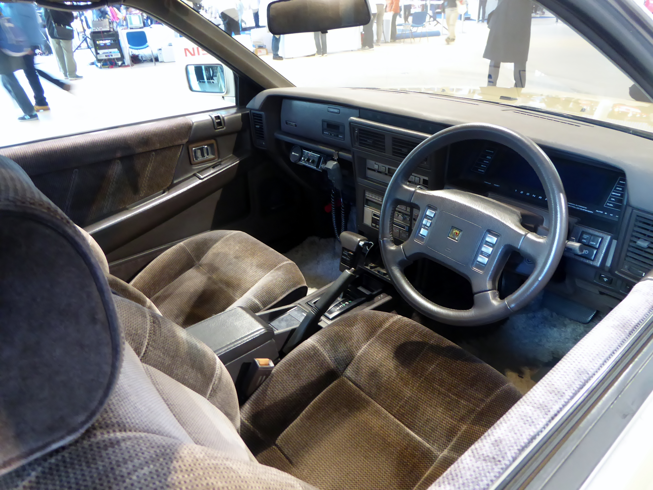 『さらば あぶない刑事』仕様の1987年型日産・レパードアルティマの内装を撮影。警察車両の設定故にそれ相応の装備が搭載されている。また前期型ではデジタルメーターだが後期型ではアナログメーターである。